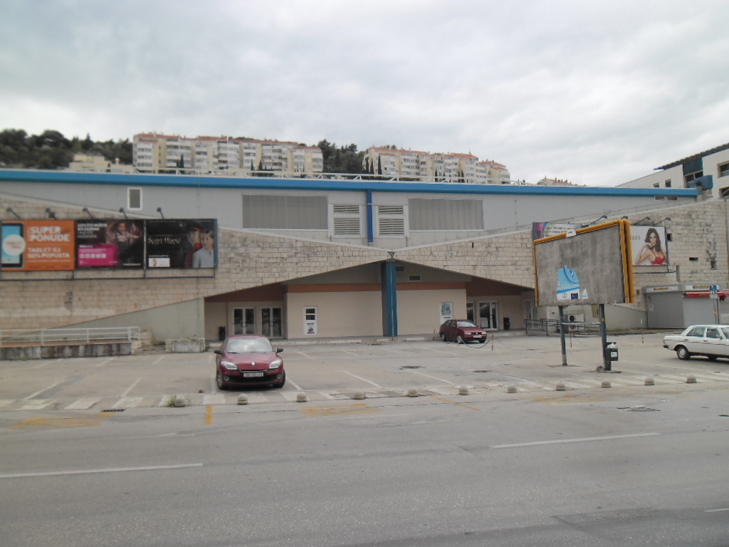 bazen Juga u Gružu